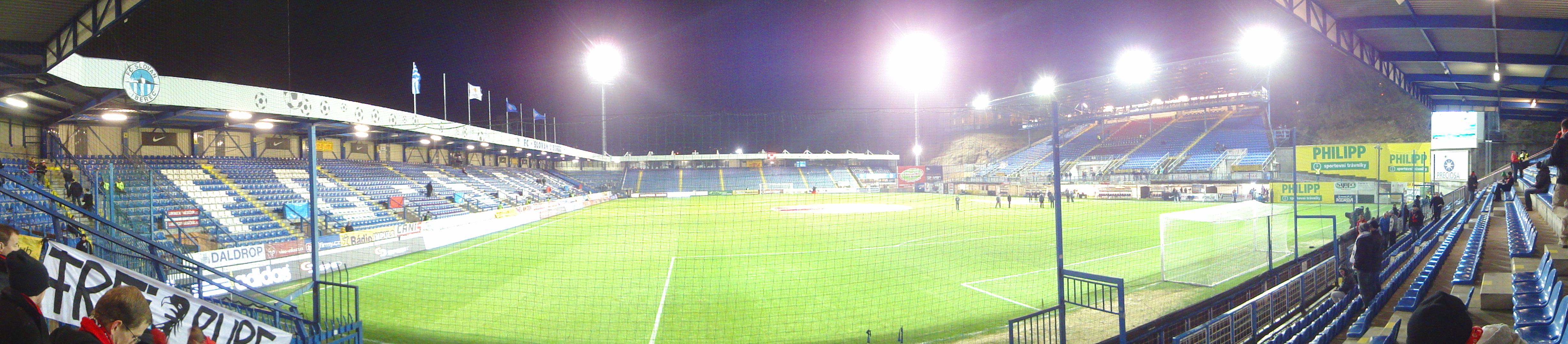 FC Slovan Liberec Stadium